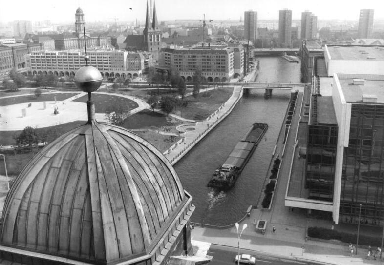 ADN-ZB Schindler 29.12.86 Berlin: Blick vom Berliner Dom auf das 1986 vollendete Marx-Engels-Forum (l.) und das architektonisch reizvolle Nikolaiviertel (l. hinten), das nach schweren Zerstörungen im Zweiten Weltkrieg wieder weitgehend aufgebaut ist. R. der Palast der Republik.